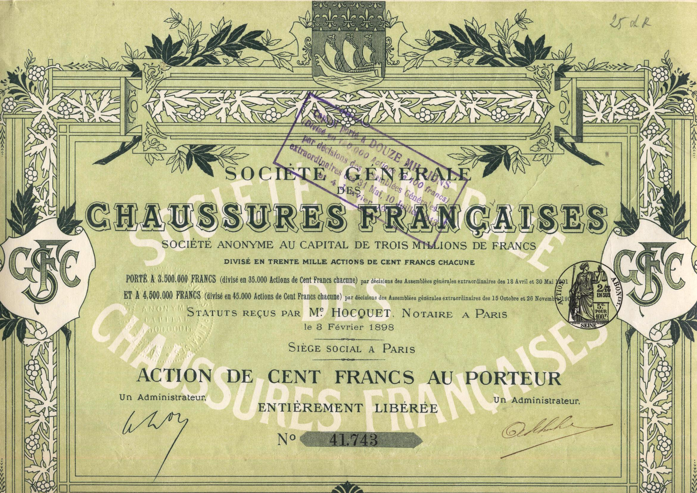 Al Aktioun vun enger franséischer Schongfabréck